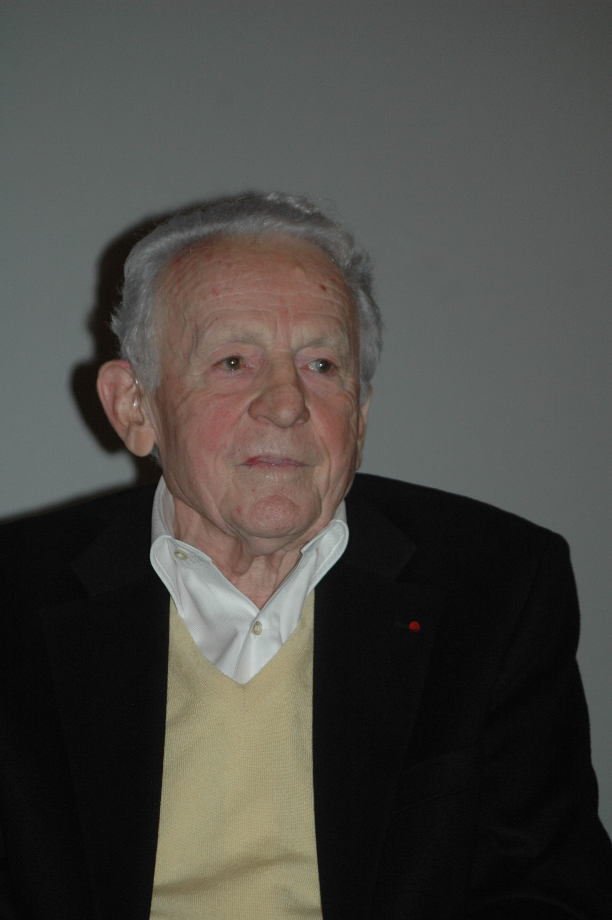 Léon Landini, résistant français, présent dans le film Les Jours Heureux, lors d'un débat au festival de Mouans-Sartoux en octobre 2013